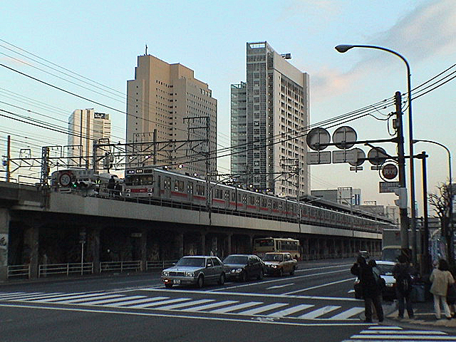 廃止前日の東急東横線桜木町駅ホームを外から望んだもの